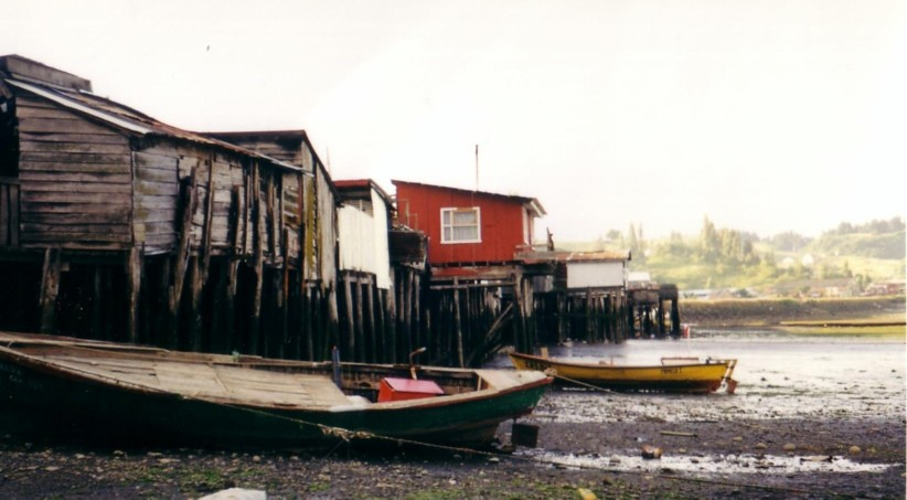 Castro, Chile